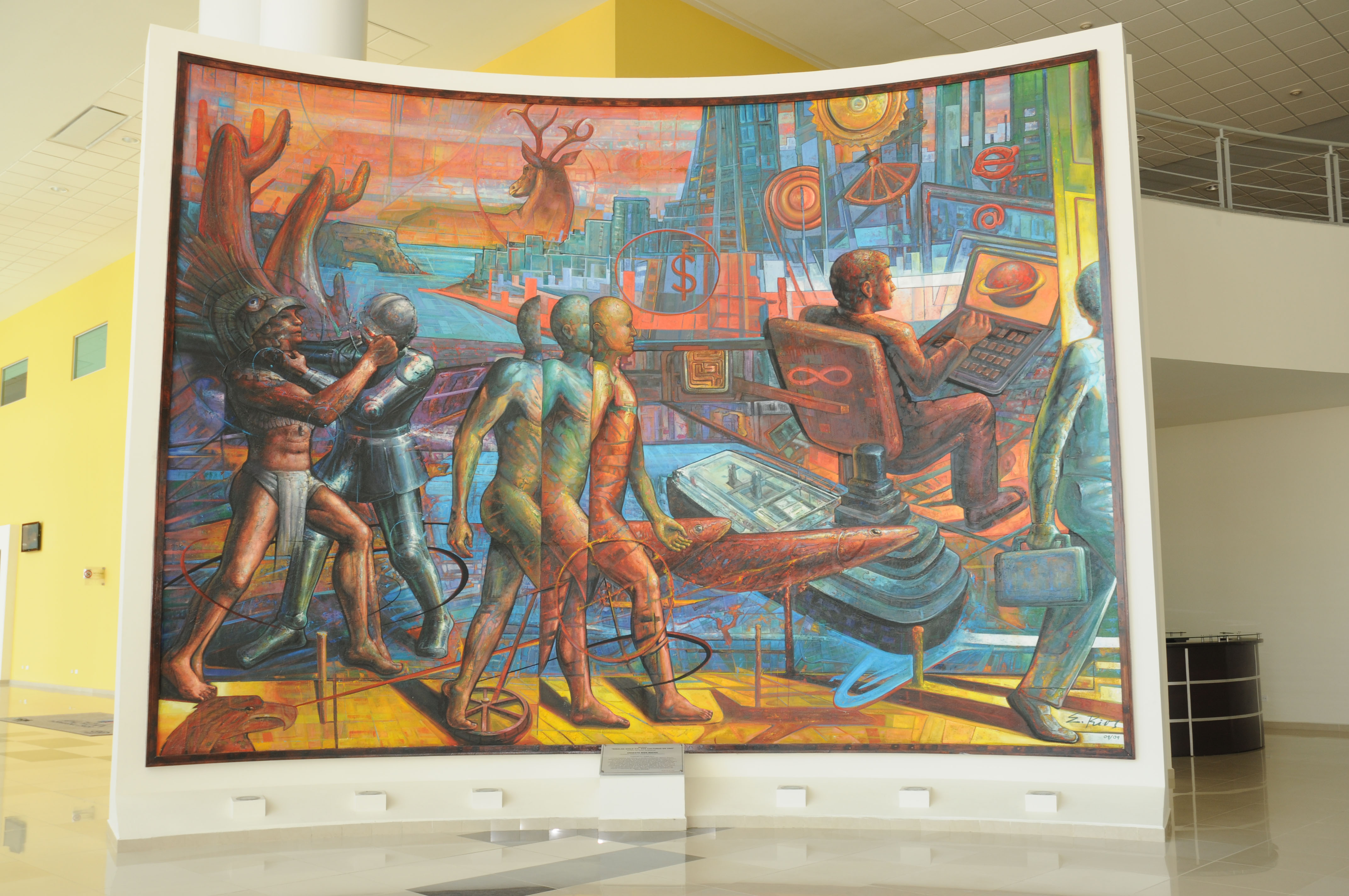 Mural "Sinaloa Siglo XXI, Fusión Histórica de Dos Razas" , del Muralista Ernesto Rios